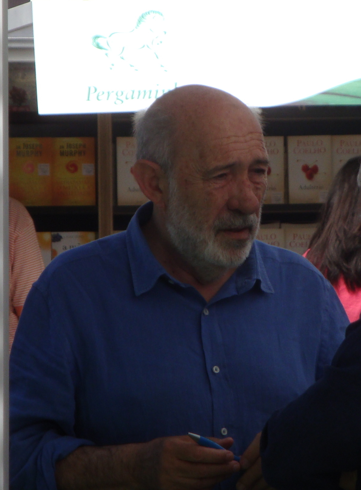 Adelino Gomes, jornalista português, na Feira do Livro de 2014